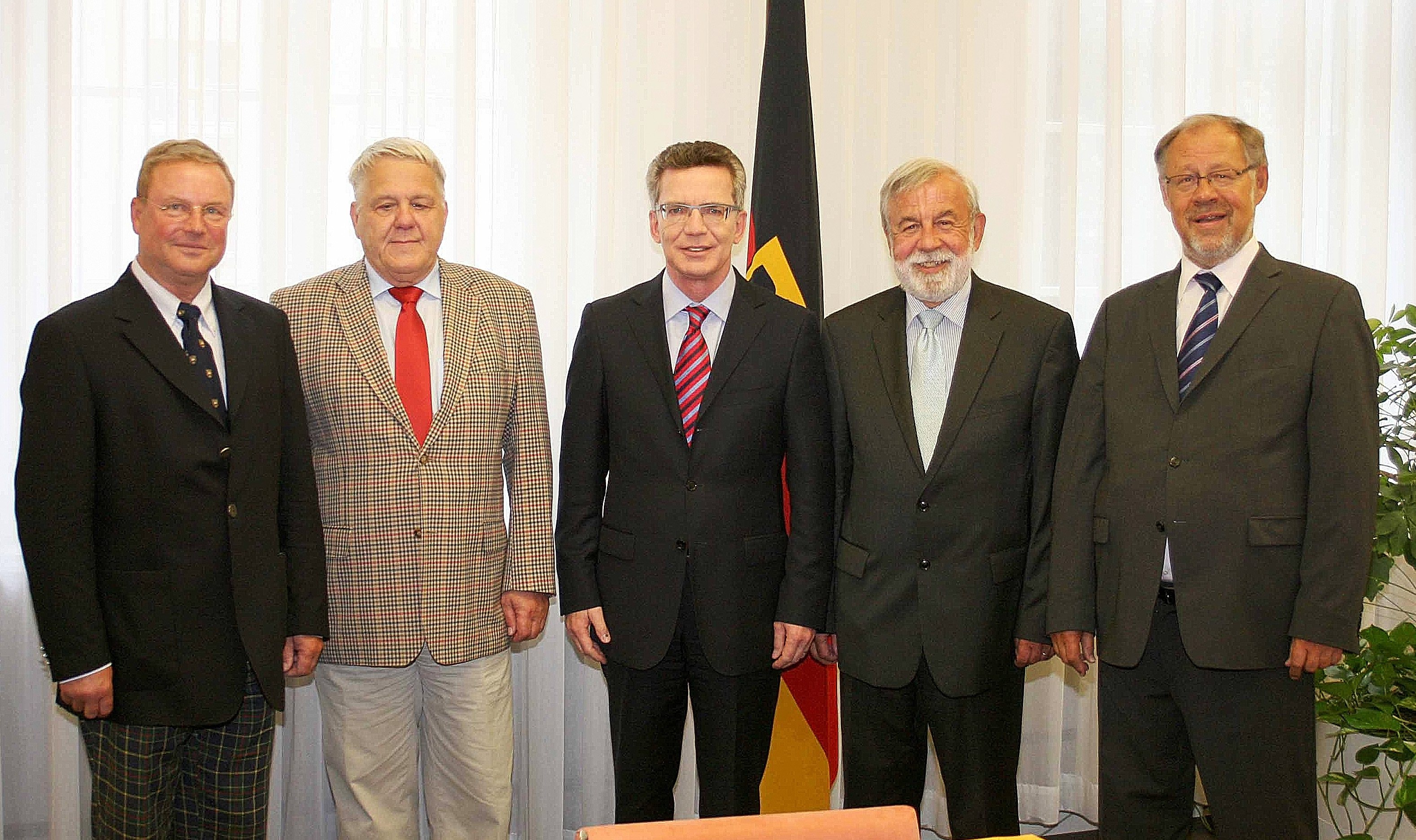 Übergabe des Pommerin-Berichts durch den Leiter der Kommission, der Historiker und Sprecher des Beirats Innere Führung der Bundeswehr, Prof. Reiner Pommerin an den Bundesminister der Verteidigung, Thomas de Maizière..von links nach rechts: Prof. Dr. Lars-Ulrich Scholl, Prof. Dr. Reiner Pommerin, Dr. Thomas de Maizière, Vizeadmiral a.D. Lutz Feldt, Staassekretär a. D. Walter Kolbow. © Bundeswehr/Grauwinkel